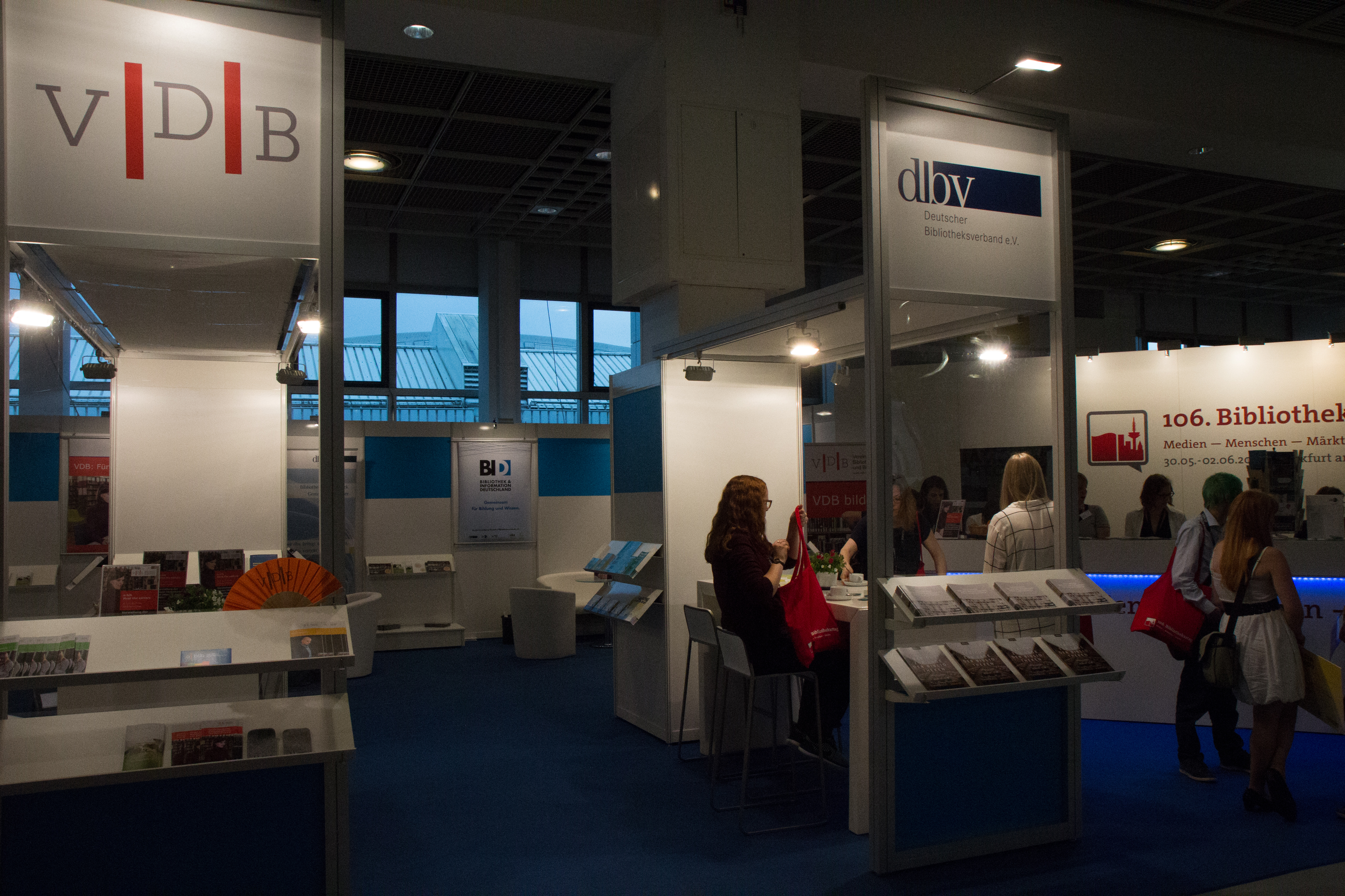 106. Deutscher Bibliothekartag in Frankfurt/Main